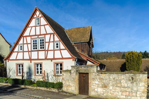 Hahnweilerhof altes Forsthaus 1